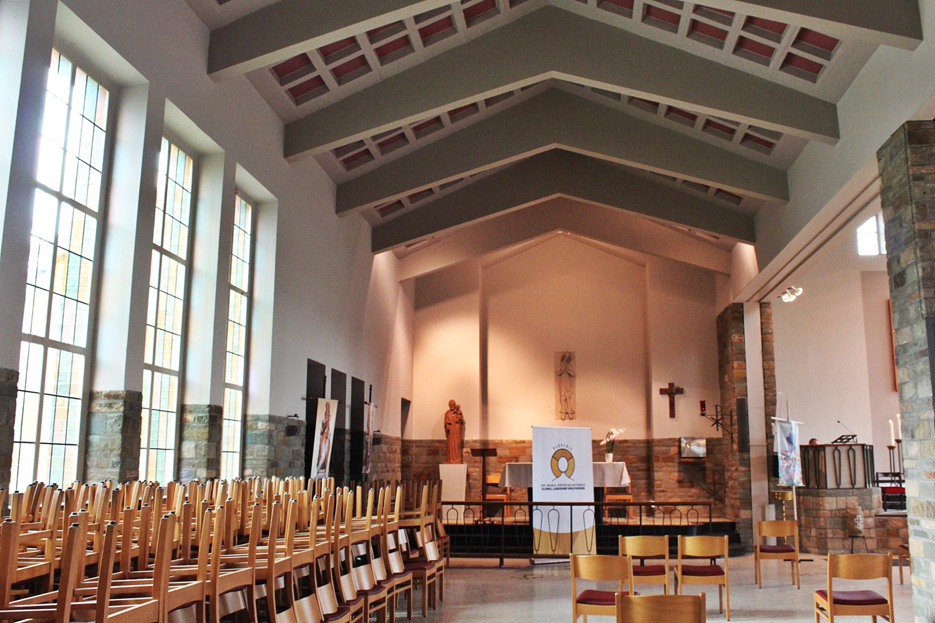 Zicht naar het koor van de bijkerk van de Onze-Lieve-Vrouw van Fatimakerk (Gijmel).